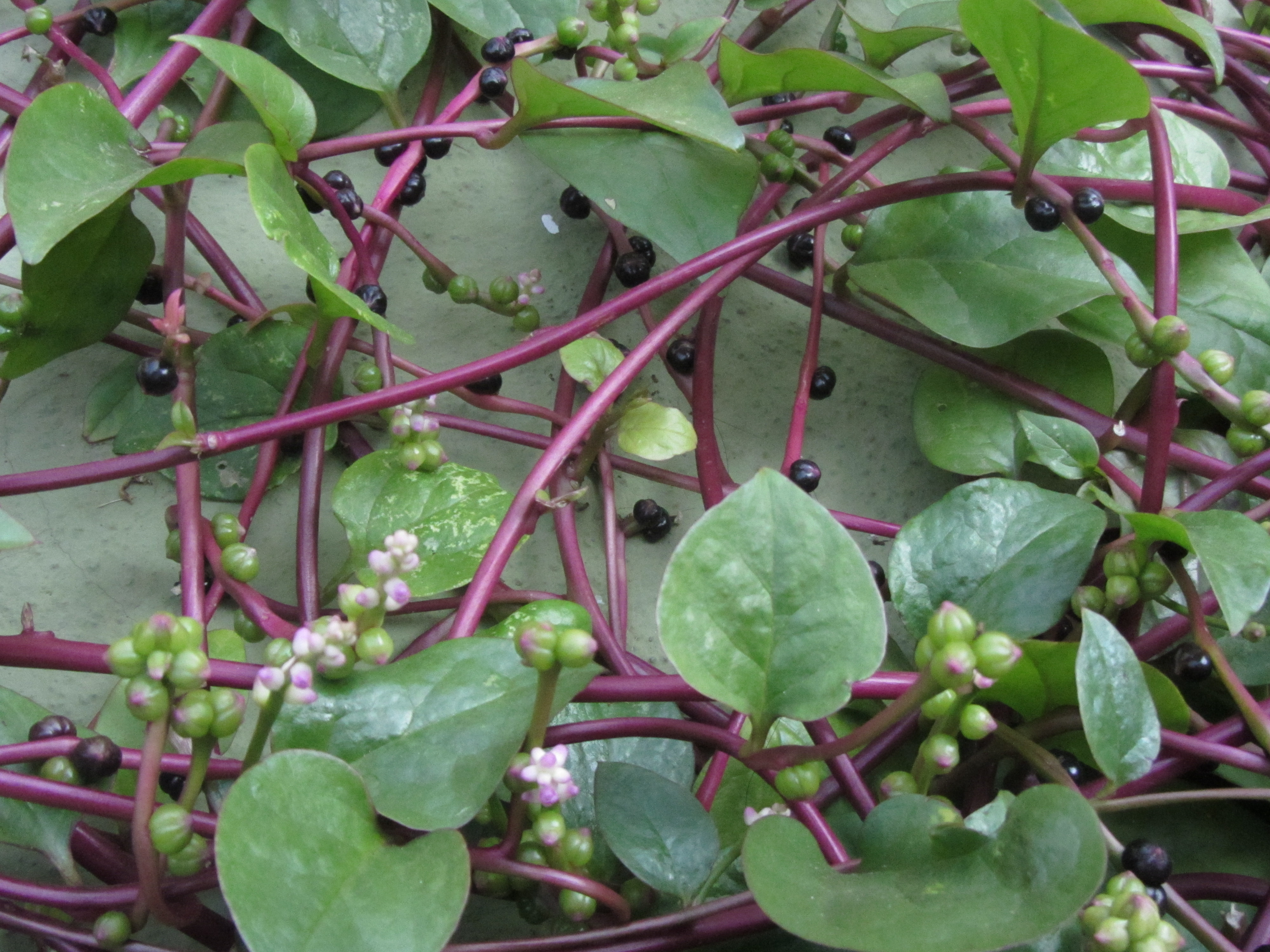 பழம் பழுத்திருக்கும் வயலைக்கொடி, பசலைக்கொடி